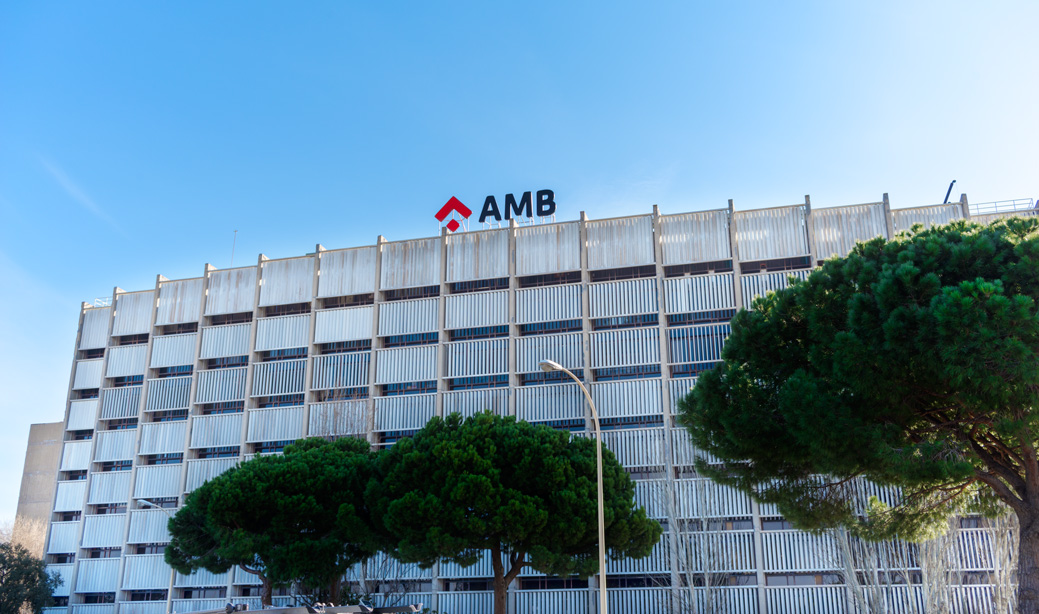 Oficines de l'AMB